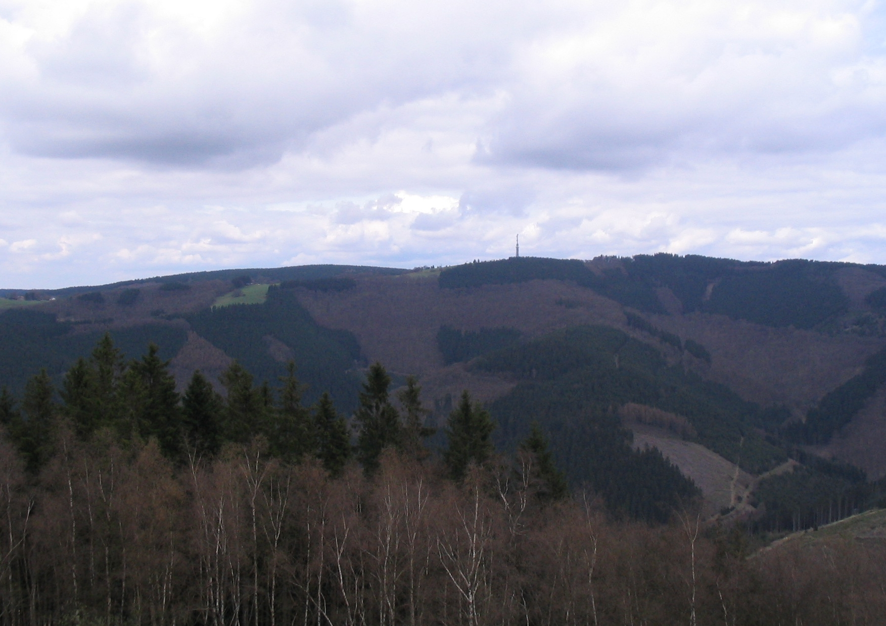 Der Schomberg (648 m) im Sauerland von Süden. Aufnahmestandort ist das Oberbecken des Pumpspeicherwerks Rönkhausen.